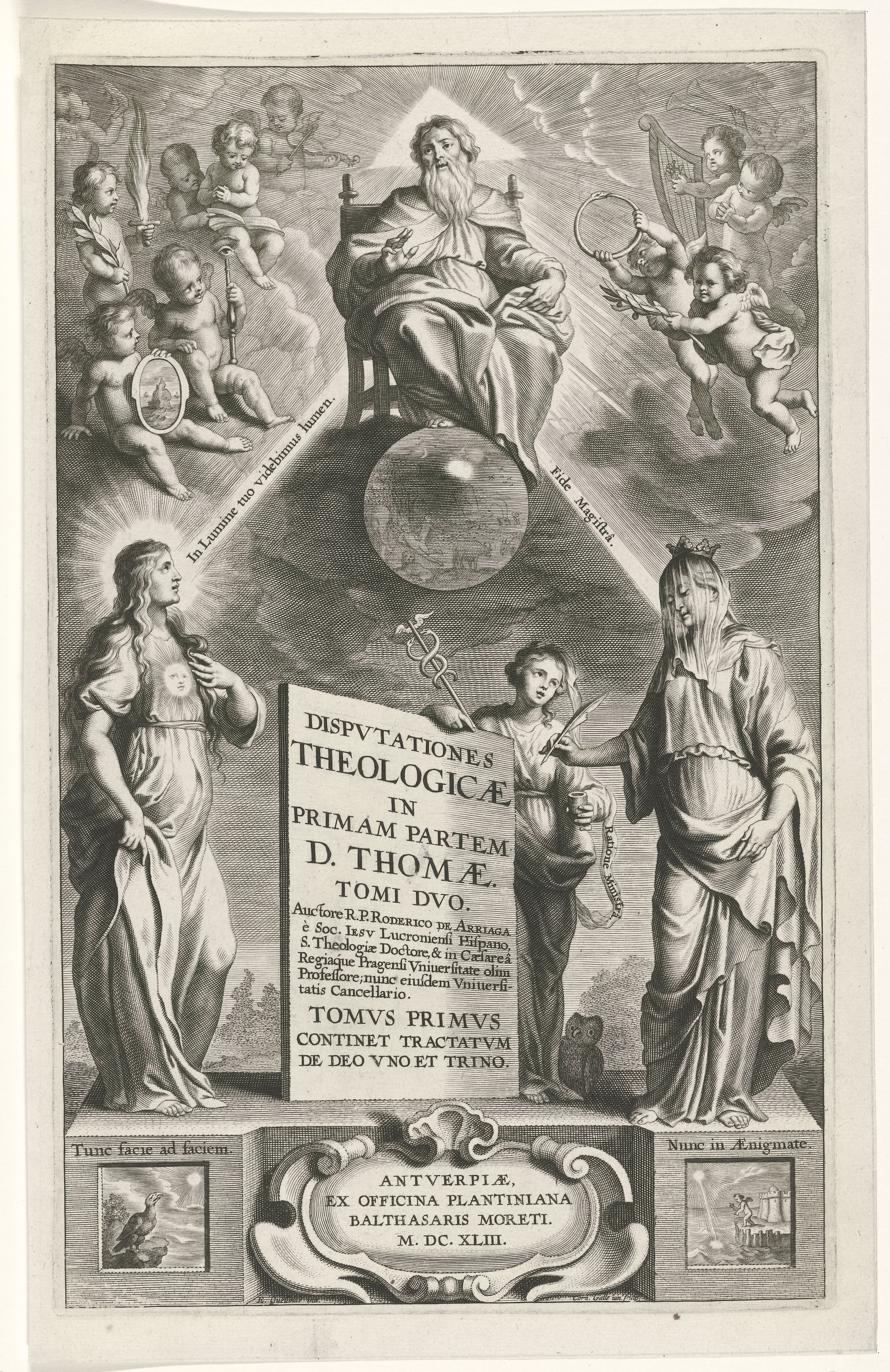 IdentificatieTitel(s): Allegorische titelpagina met God de Vader en personificaties van Licht en GeloofTitelpagina voor: Rodrigo de Arriaga, Disputationes theologicae. Antwerpen: 1643Objecttype: prent titelpagina Objectnummer: RP-P-OB-7070Opschriften / Merken: verzamelaarsmerk, verso, gestempeld: Lugt 240Omschrijving: God de Vader zit op een stoel in de hemel. Hij rust met zijn voet op een globe Waar: op het paradijs te zien is. Op een sokkel staan de personificaties van Licht (links) en Geloof (rechts). Geloof schrijft met een veer de titel van het boek op een stenen plaat.VervaardigingVervaardiger: prentmaker: Cornelis Galle (II) (vermeld op object)naar ontwerp van: Erasmus Quellinus (II) (vermeld op object)uitgever: Officina Plantiniana (vermeld op object)uitgever: Balthasar Moretus (I) (vermeld op object)Plaats vervaardiging: AntwerpenDatering: 1643Fysieke kenmerken: gravureMateriaal: papier Techniek: graveren (drukprocedé)Afmetingen: plaatrand: h 318 mm × b 198 mmToelichtingTitelpagina voor: Rodrigo de Arriaga, Dispvtationes theologicæ in primam partem D. Thomæ. Antwerpen: ex officina Plantiniana, B. Moretus, 1643.OnderwerpWat: God the Father (as bearded old man) enthroned, usually with crown or tiara, and with sceptre and/or globeFaith, 'Fides'; 'Fede', 'Fede catholica', 'Fede christiana', 'Fede christiana catholica' (Ripa) ~ one of the Three Theological VirtuesVerwerving en rechtenVerwerving: overdracht van beheer 1816Copyright: Publiek domein